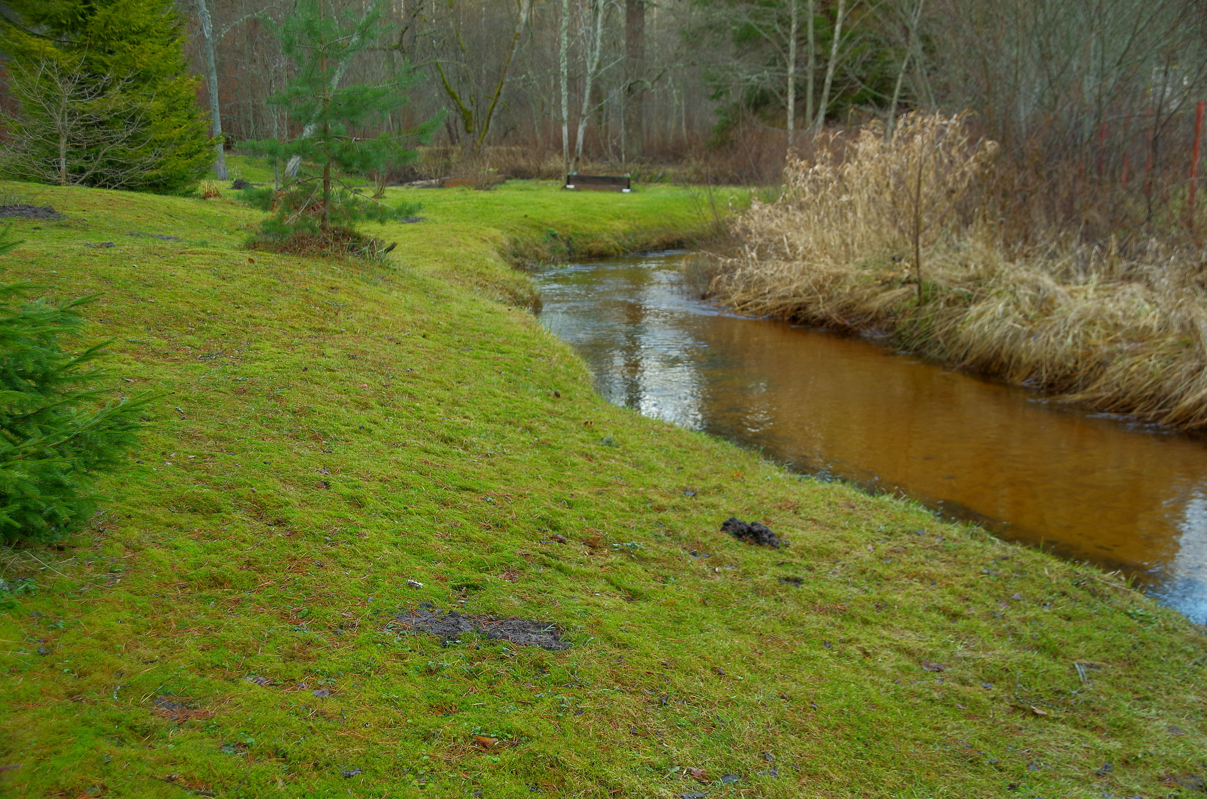 Tuulna oja on oja Harju maakonnas; Treppoja lisaoja